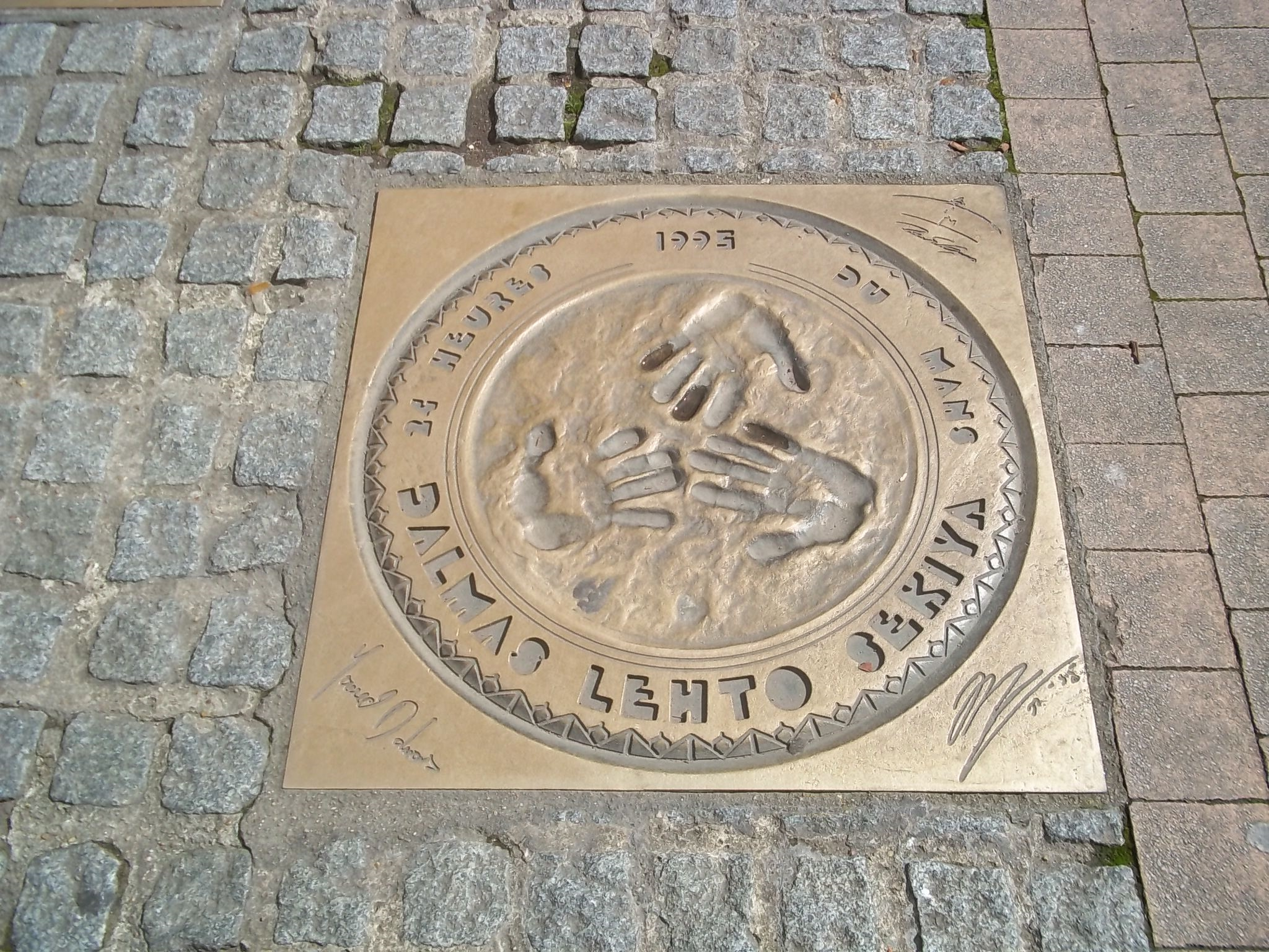 Plaque de bronze des empreintes des vainqueurs des 24 heures 1995